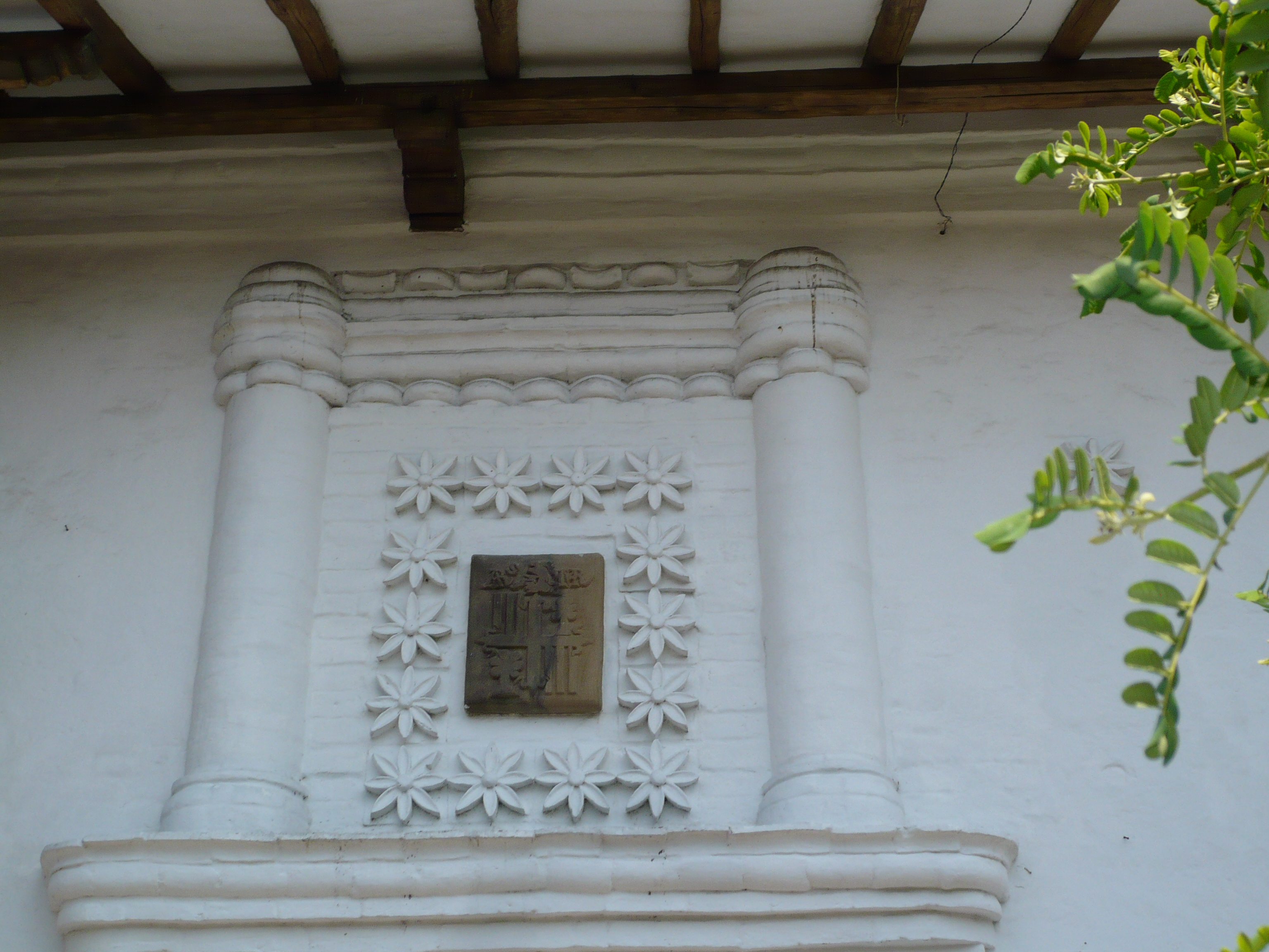 Escudo de la Casa del Virrey o Escudo de Marisancena. Cartago, Valle, Colombia.